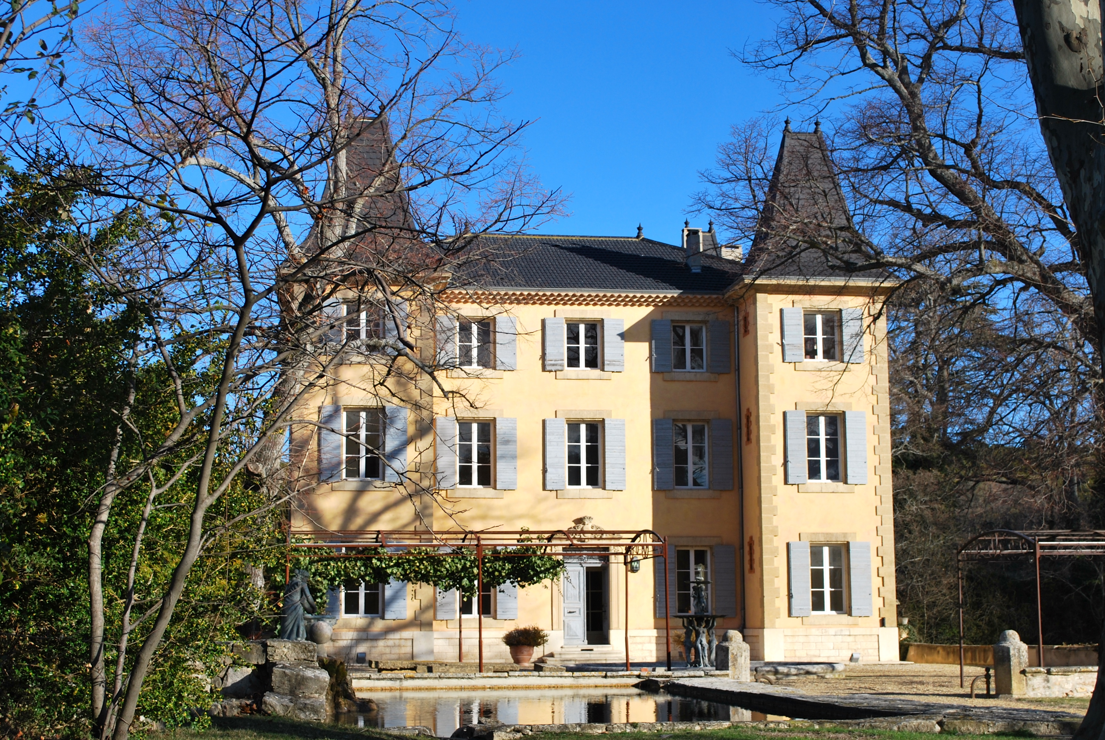 Château de La Brillanne à Puyricard